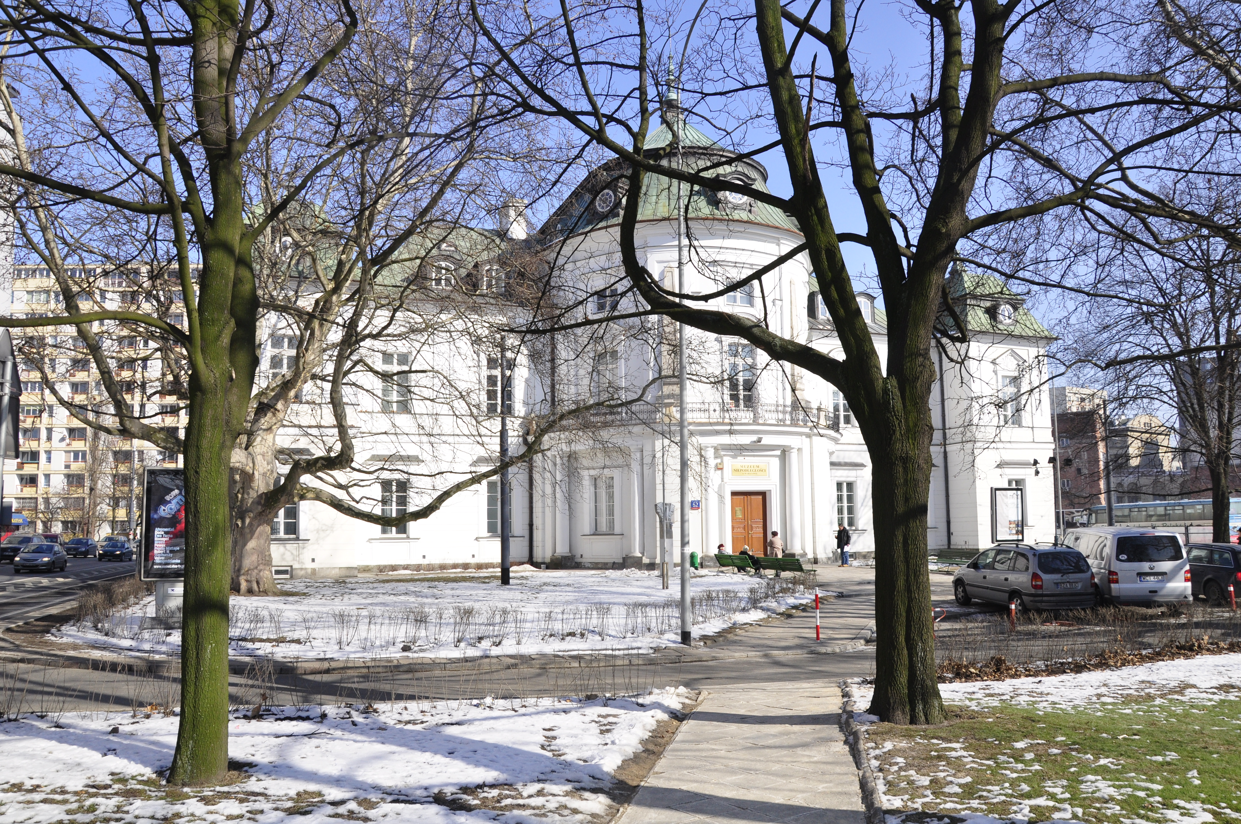 Unabhängigkeitsmuseum in Warschau